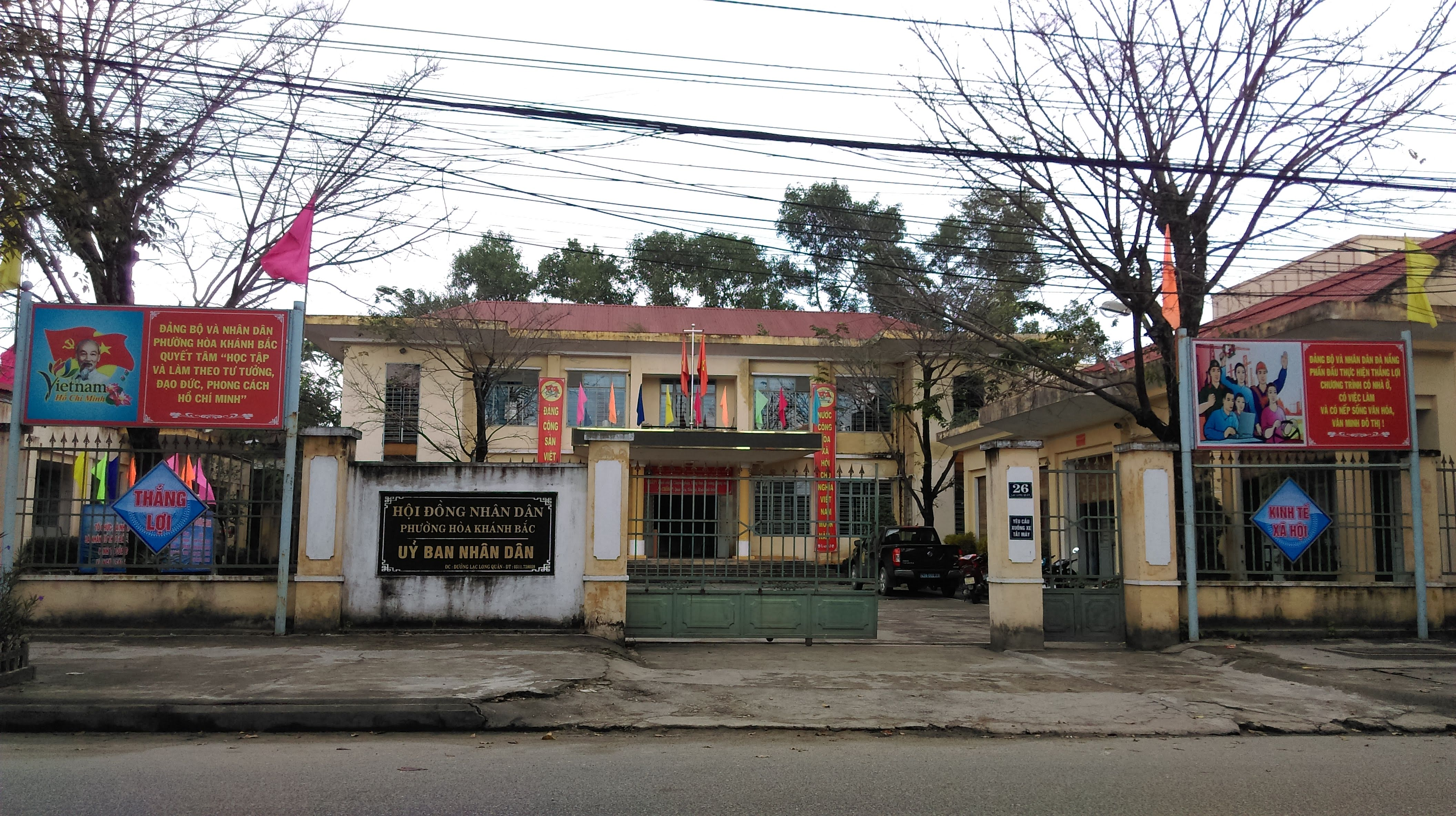 UBND phường Hòa Khánh Bắc, Liên Chiểu, Đà Nẵng